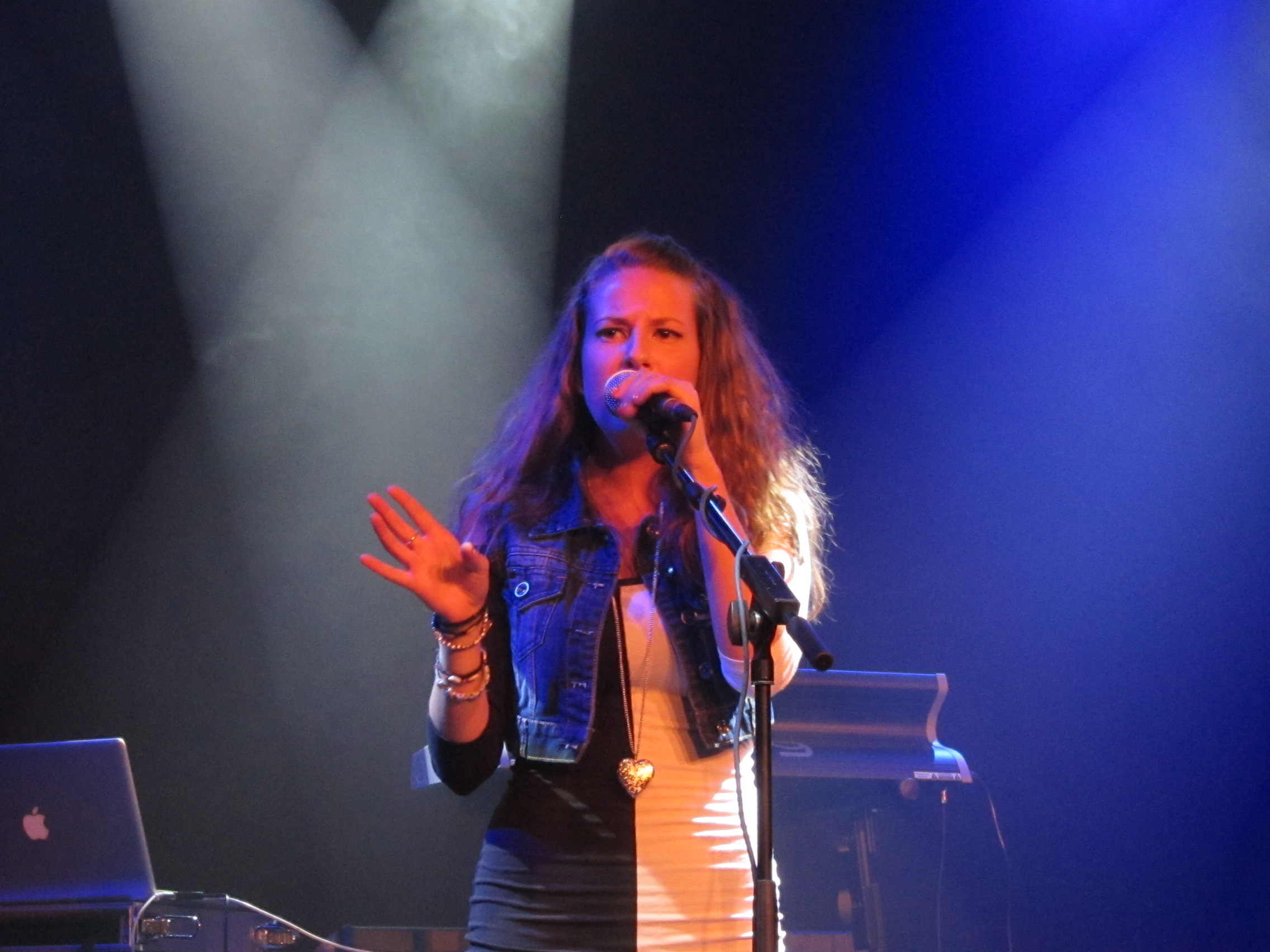 Ronya esiintymässä Svenska talande klubben Korjaamo Helsinki 7 Sep 2011